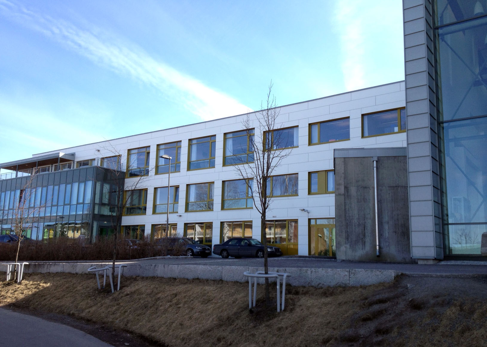 Lindeberg skole i Oslo